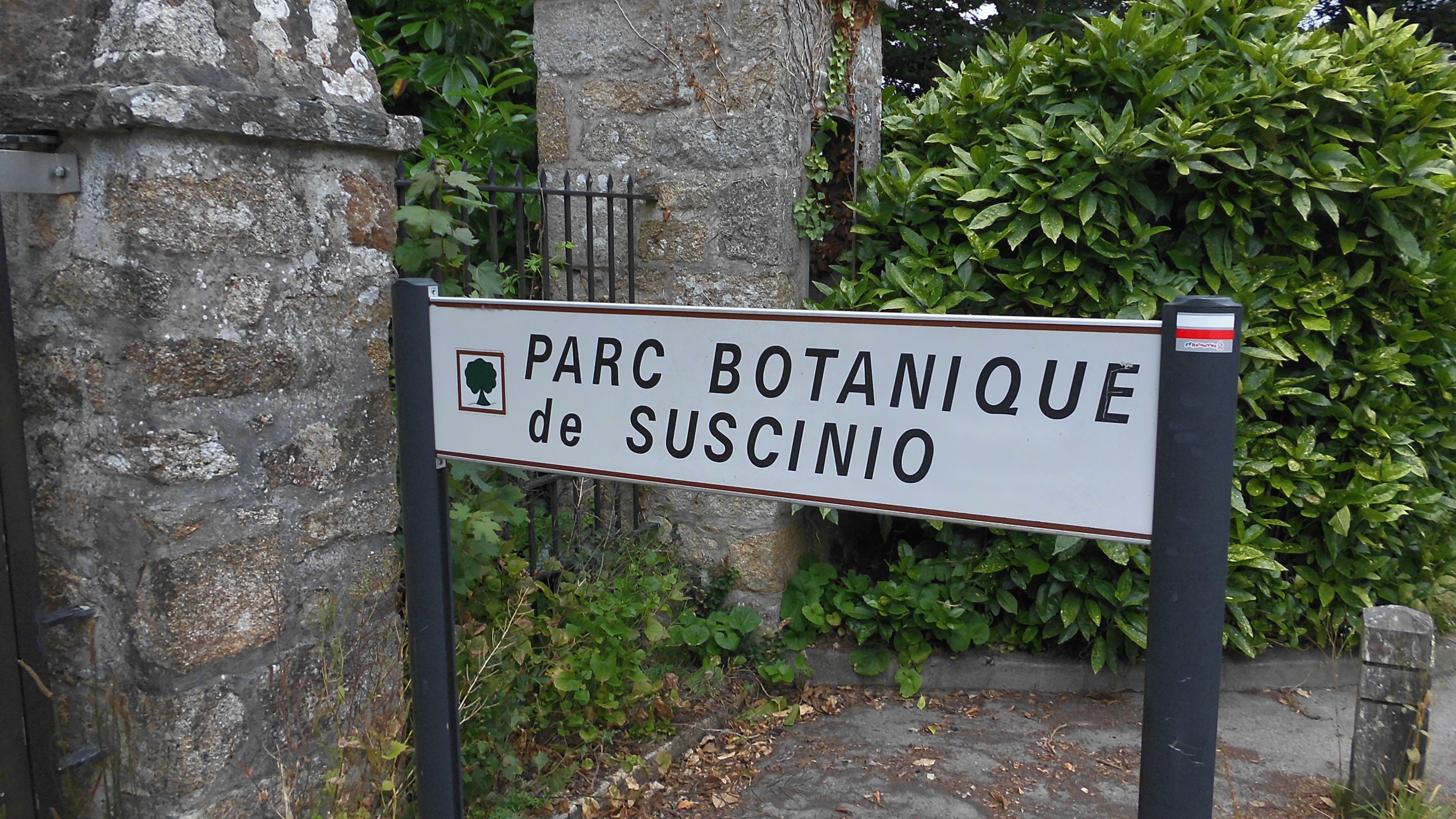 Le parc botanique de Suscinio, situé à Ploujean, est classé "arbres remarquables de France"